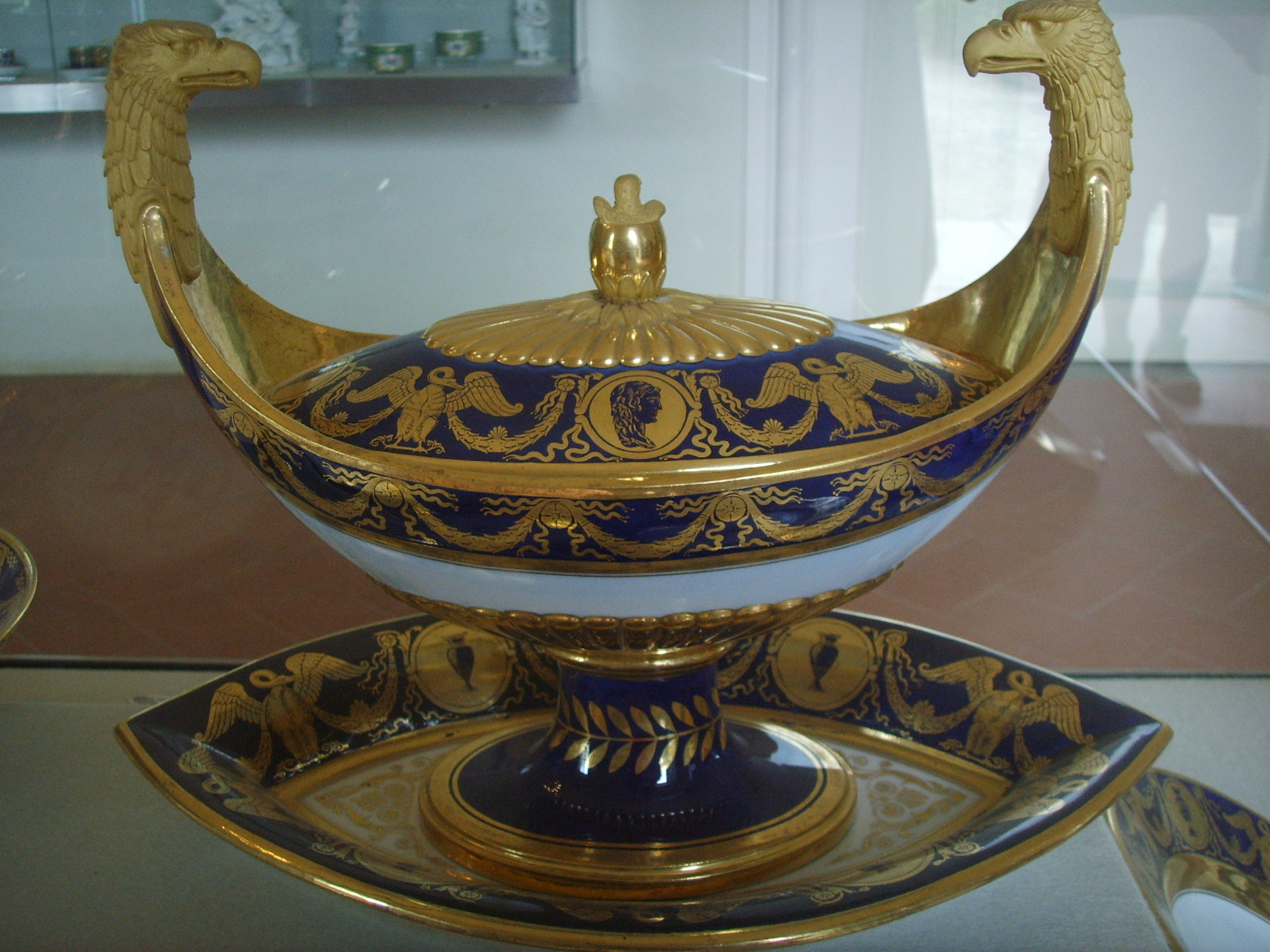 Museo delle porcellane di Firenze, servizio di elisa baciocchi, sevres, 1809-1810